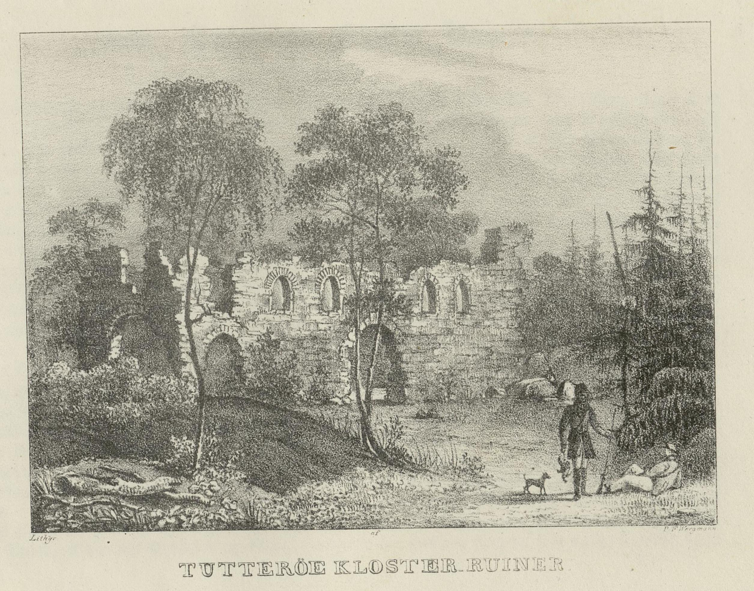 Illustrasjon hentet fra boken "Norge, fremstillet i lithographerede Billeder efter Naturen" av Wergmann, P.F. og utgitt av P.F. Wergmann (Christiania, 1836-1837)